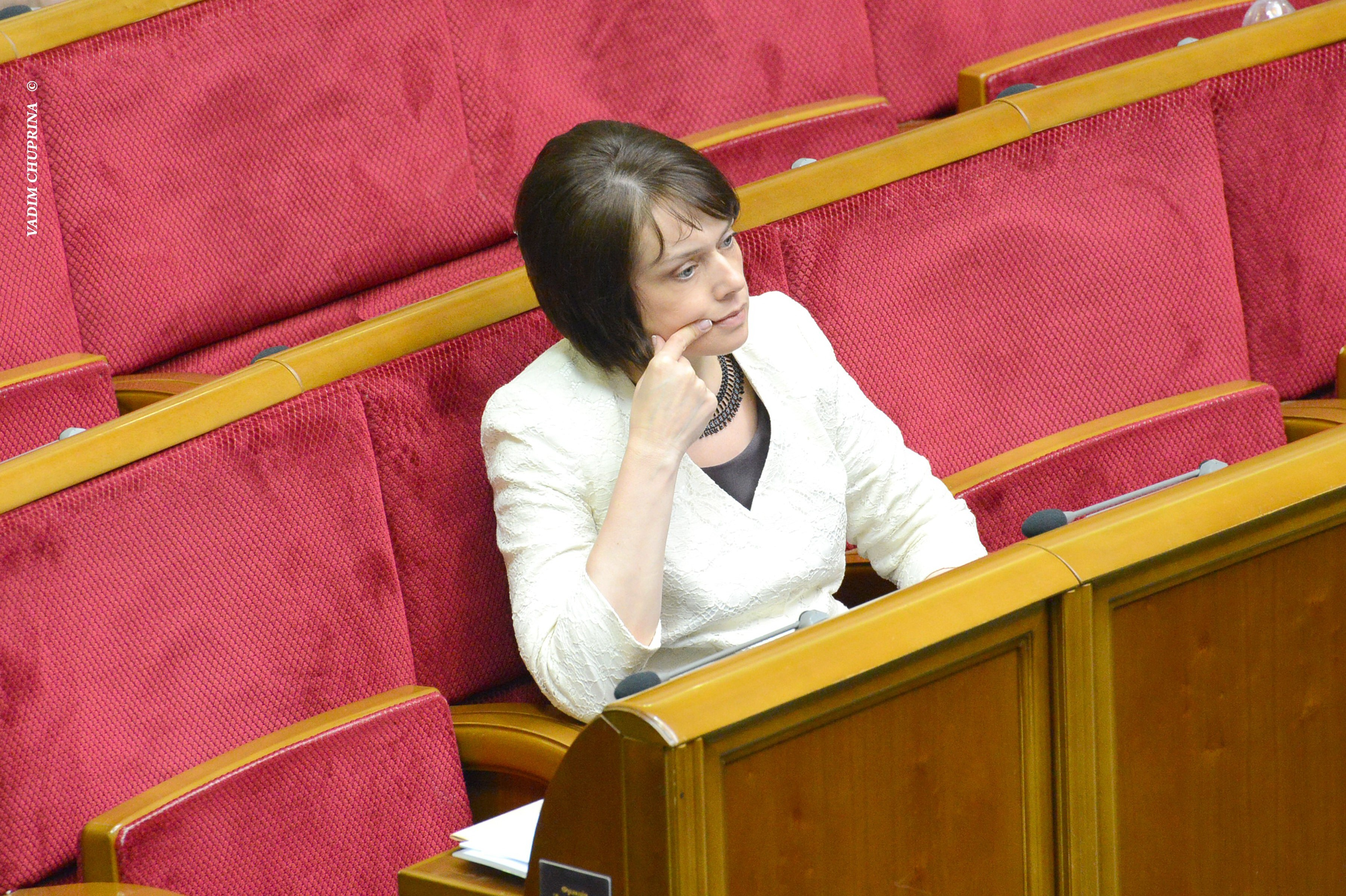 ВЕРХОВНА РАДА УКРАЇНИ 2013 , фото Вадим Чуприна ©